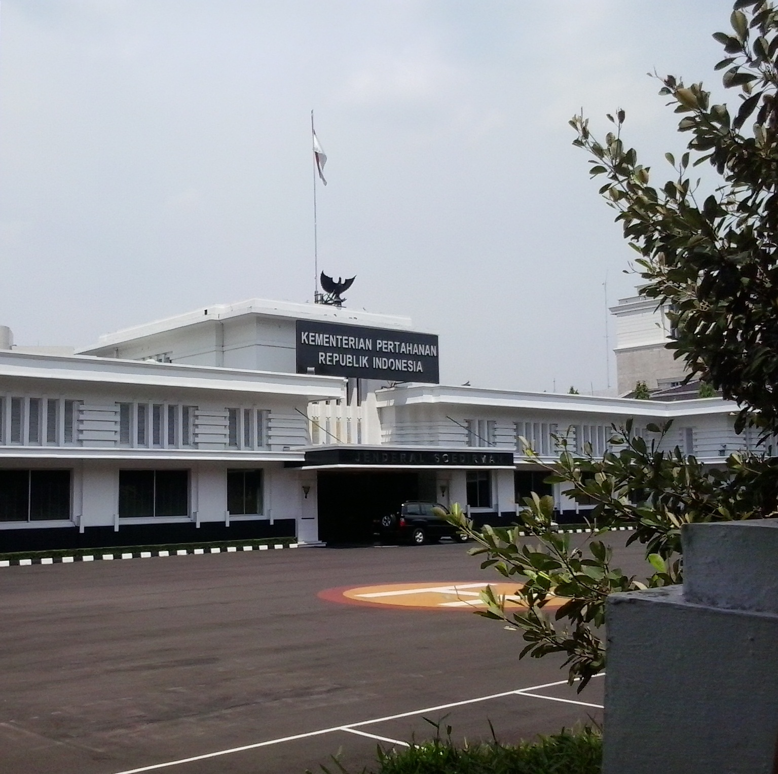 Kantor Kementerian Pertahanan RI di Jalan Medan Merdeka Barat, Jakarta